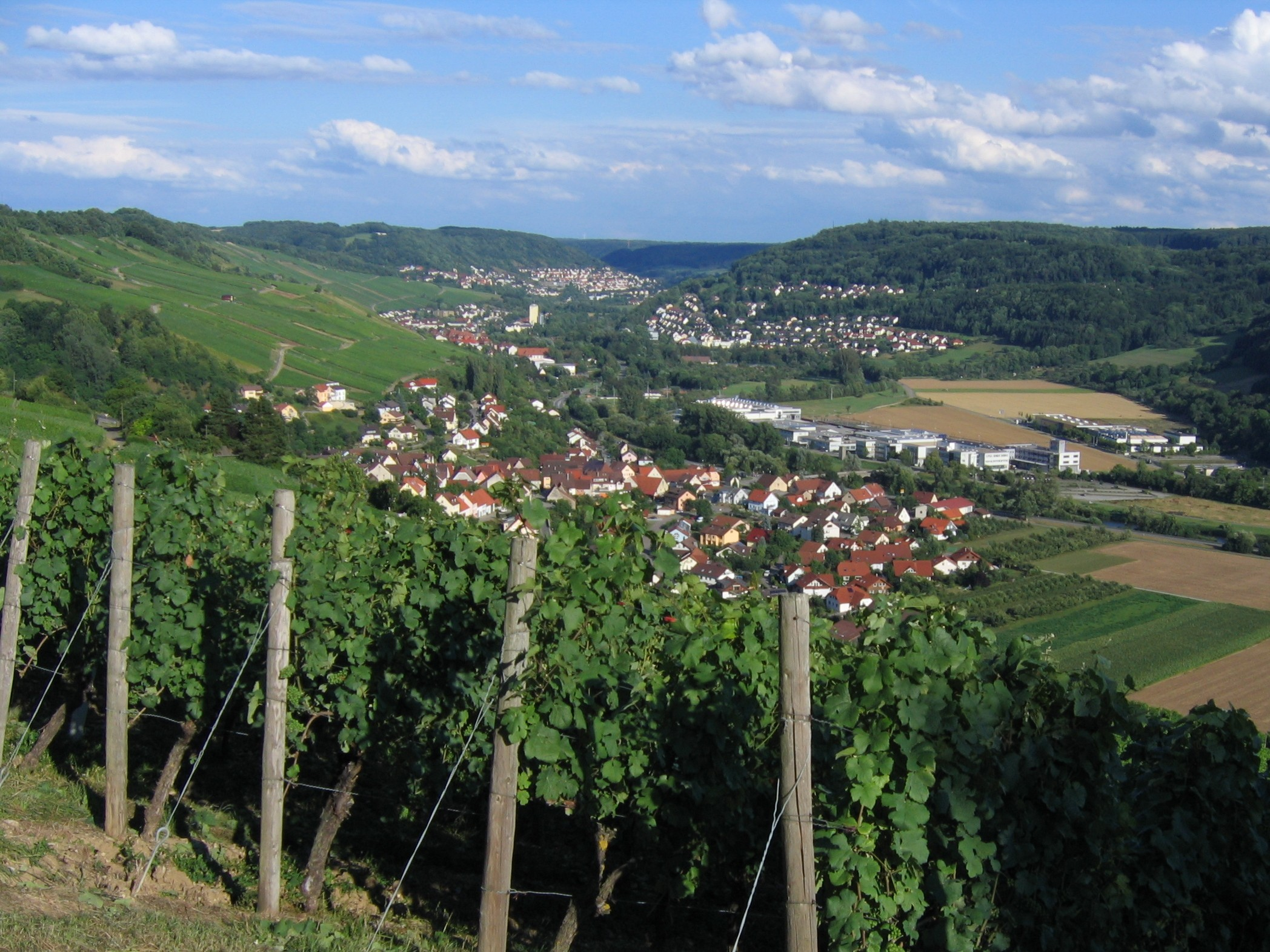 Blick vom Criesbacher Sattel aufs Kochertal flußaufwärts mit den Ortschaften Criesbach, Ingelfingen, Nagelsberg und Künzelsau.